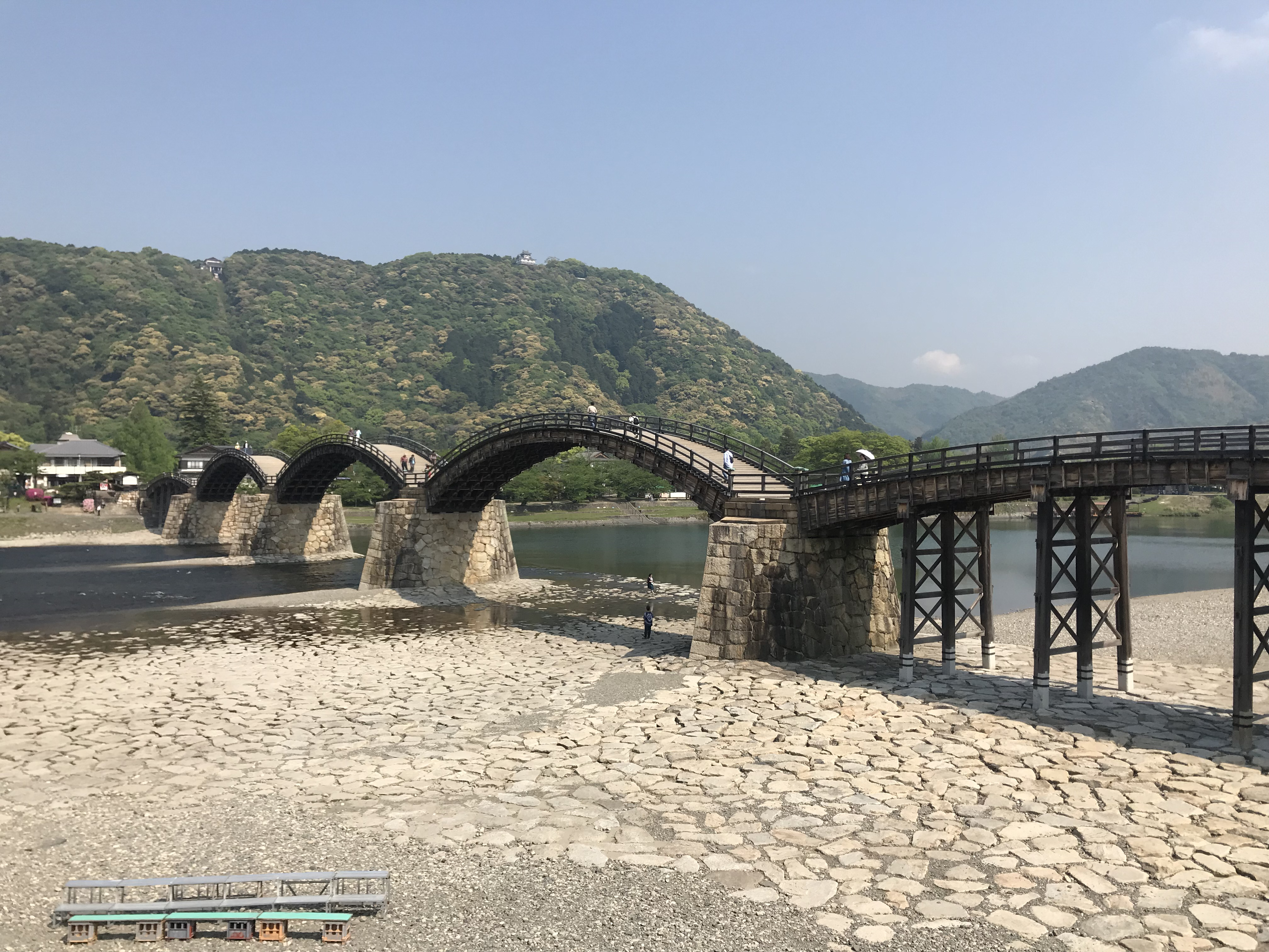 岩国城と錦帯橋